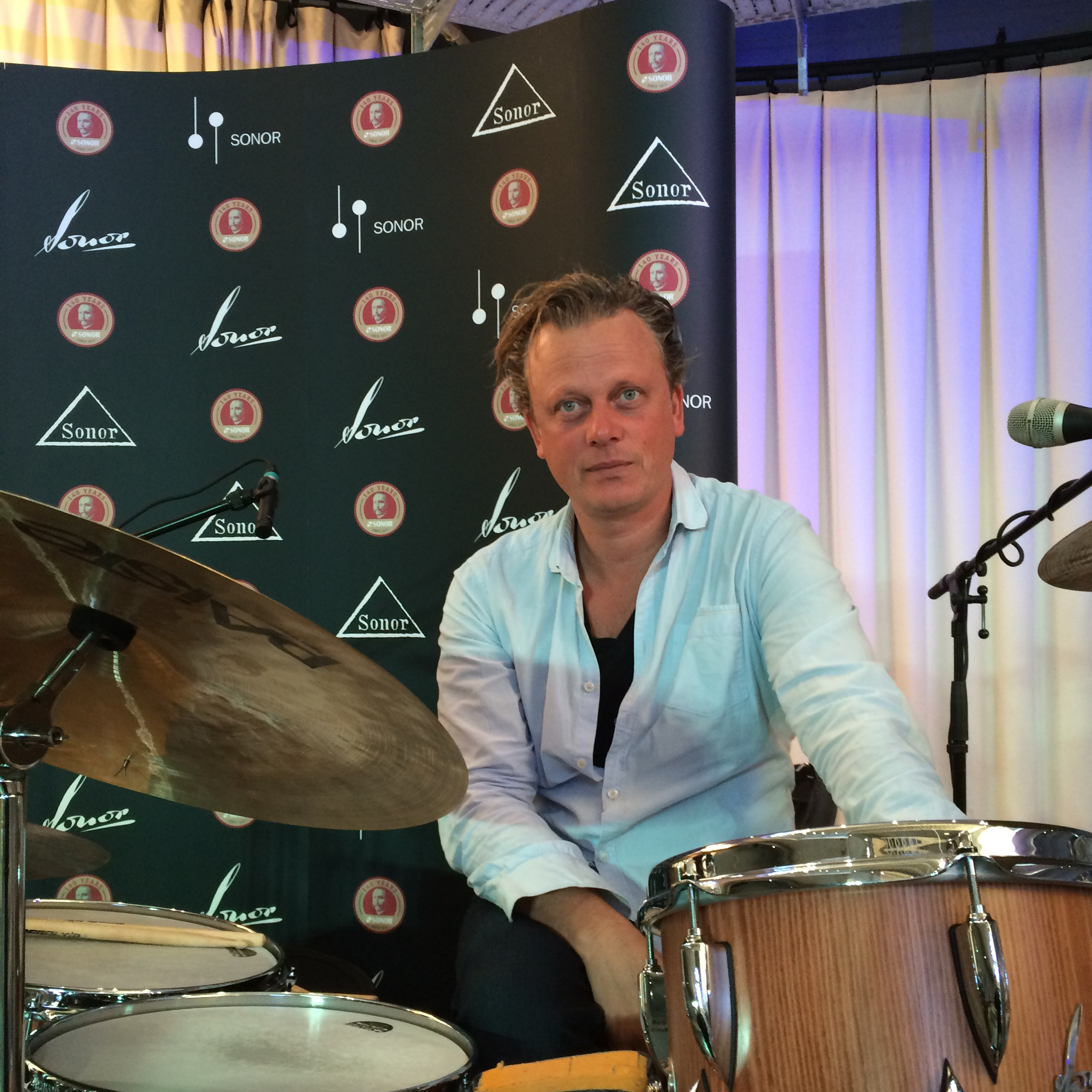 Der Schlagzeuger Wim de Vries am 1.10.2015, SONOR Promotiontour, PPC Hannover